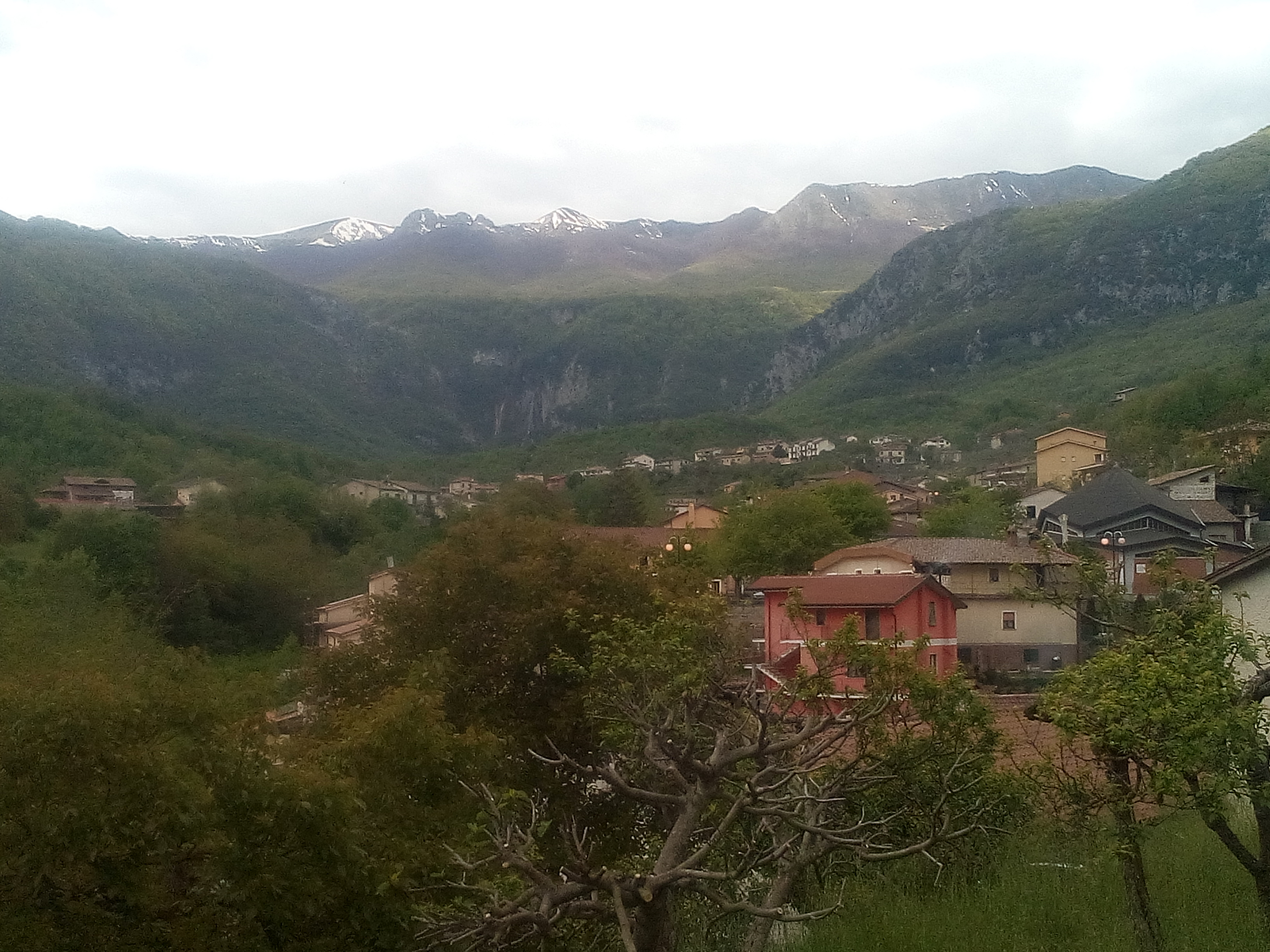 Veduta di Grancia (Abruzzo)